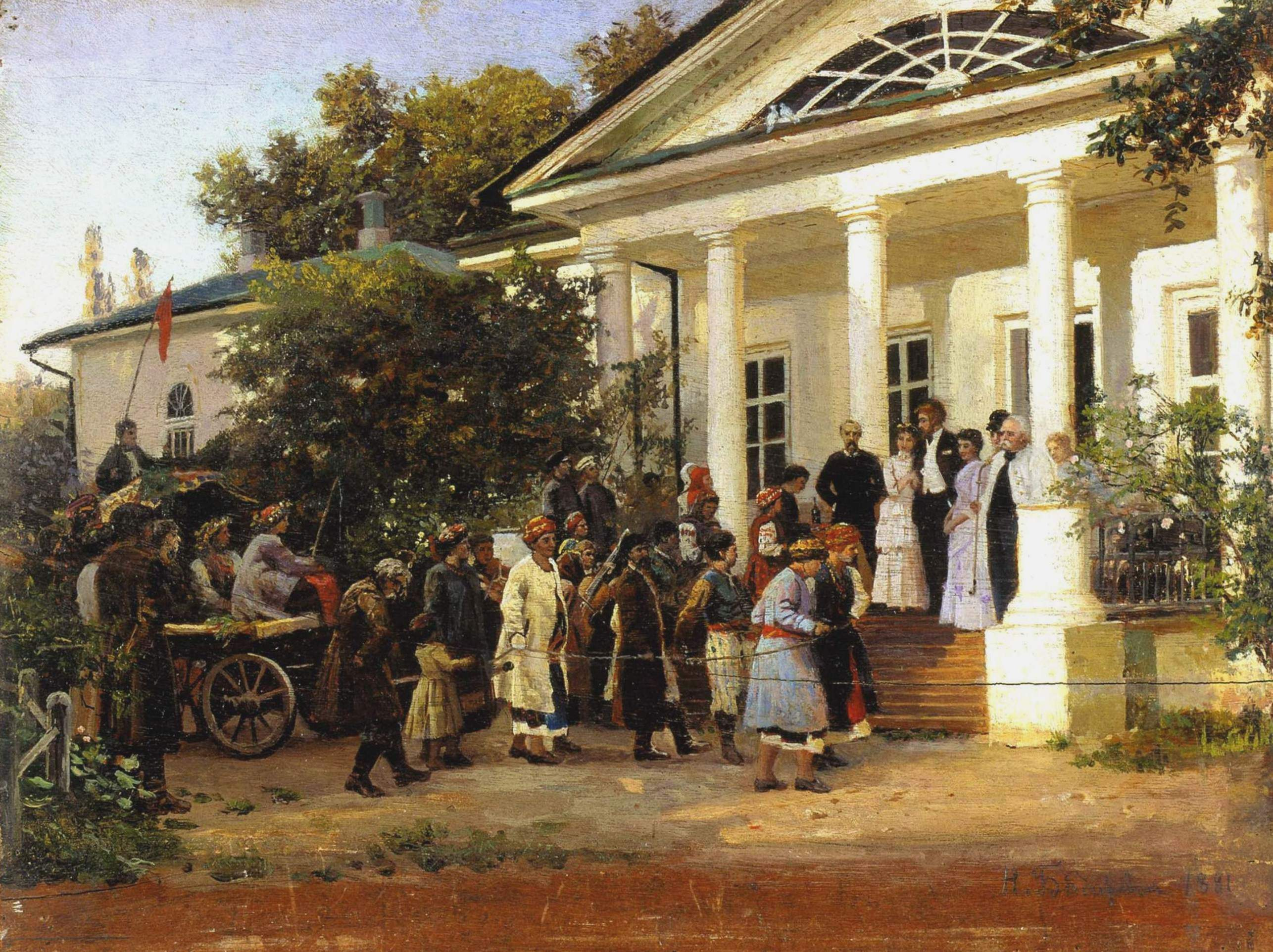 «Свадьба в Малороссии. (Понедельник, молодые у помещика)». Эскиз к картине «Свадьба в Малороссии». Дерево, масло. 29 x 39 см. Национальный художественный музей Украины, Киев.